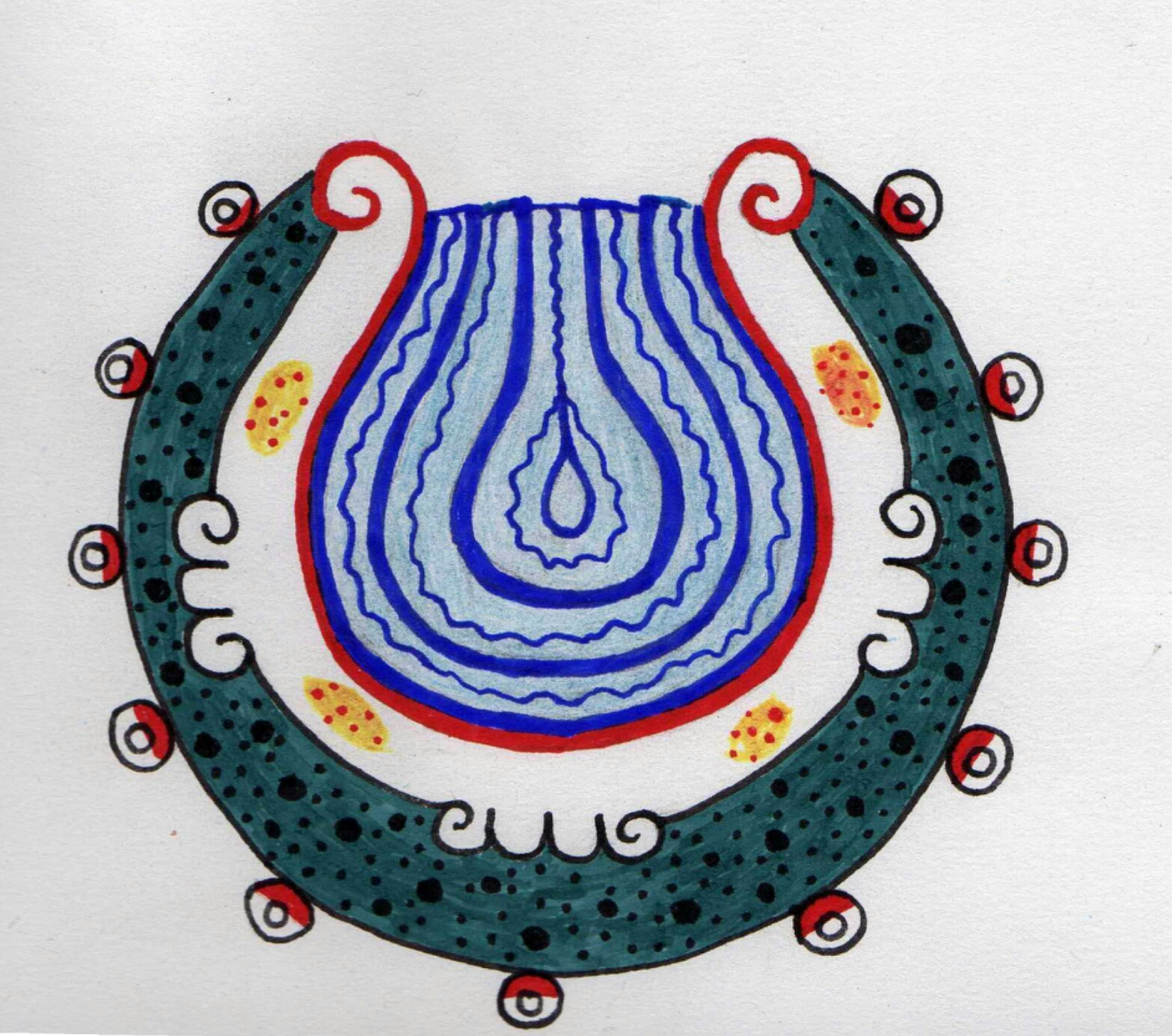 Dibujado en base a una imagen del Códice Borgia